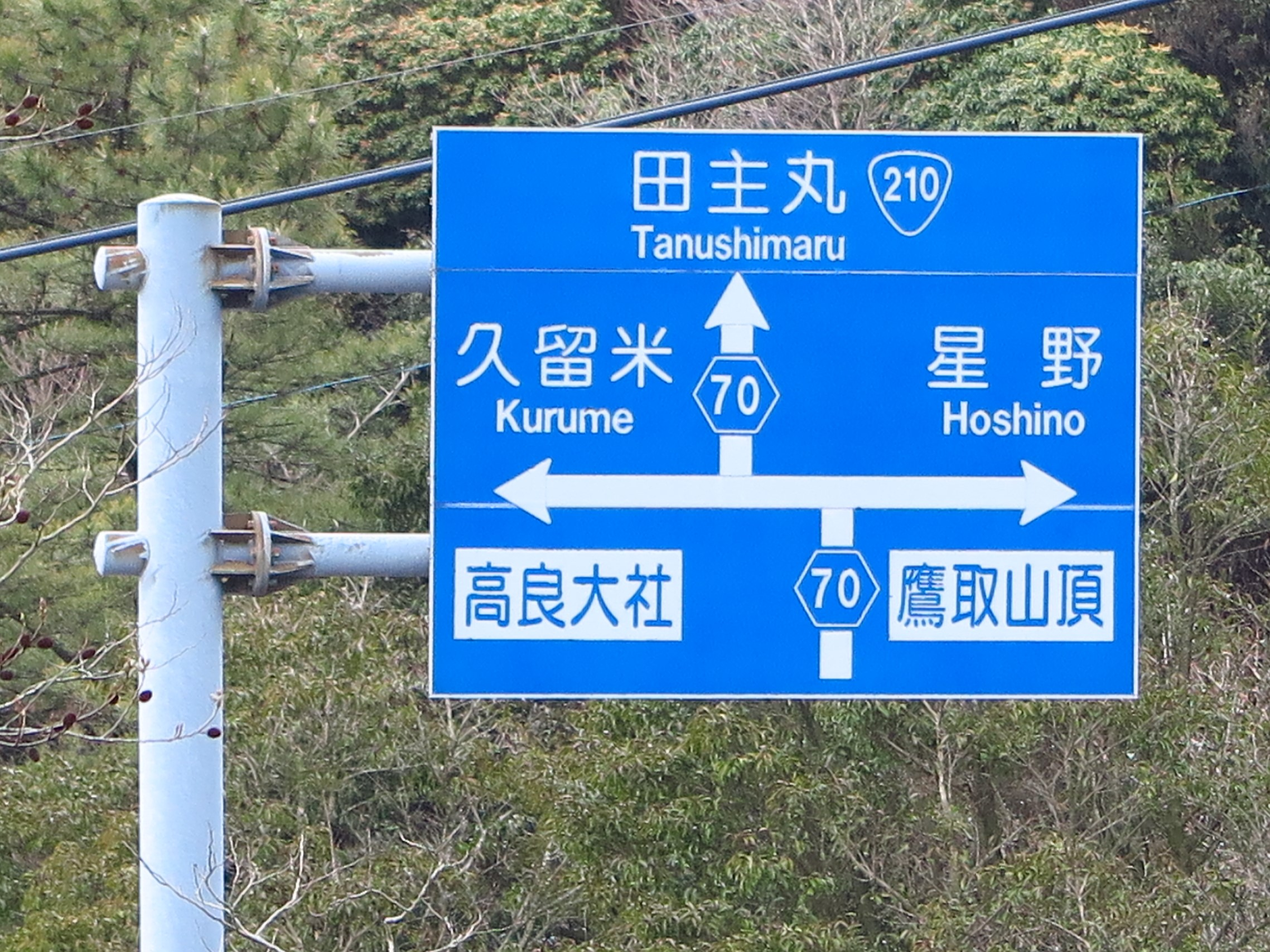 福岡県道70号 かんかけ峠付近に設置されている案内標識